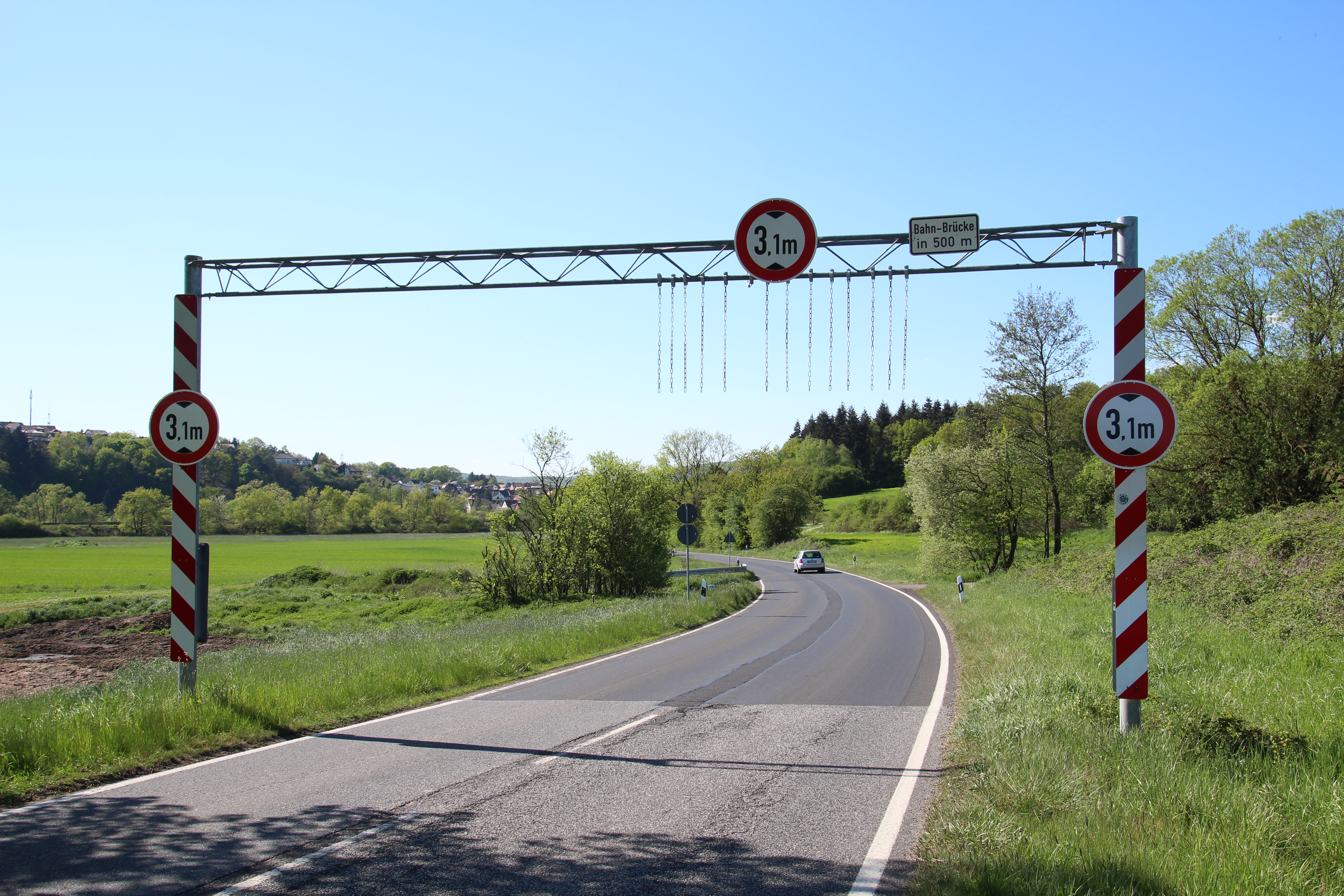 Sogenannter Klingelbalken als Warnung vor niedriger Brücke